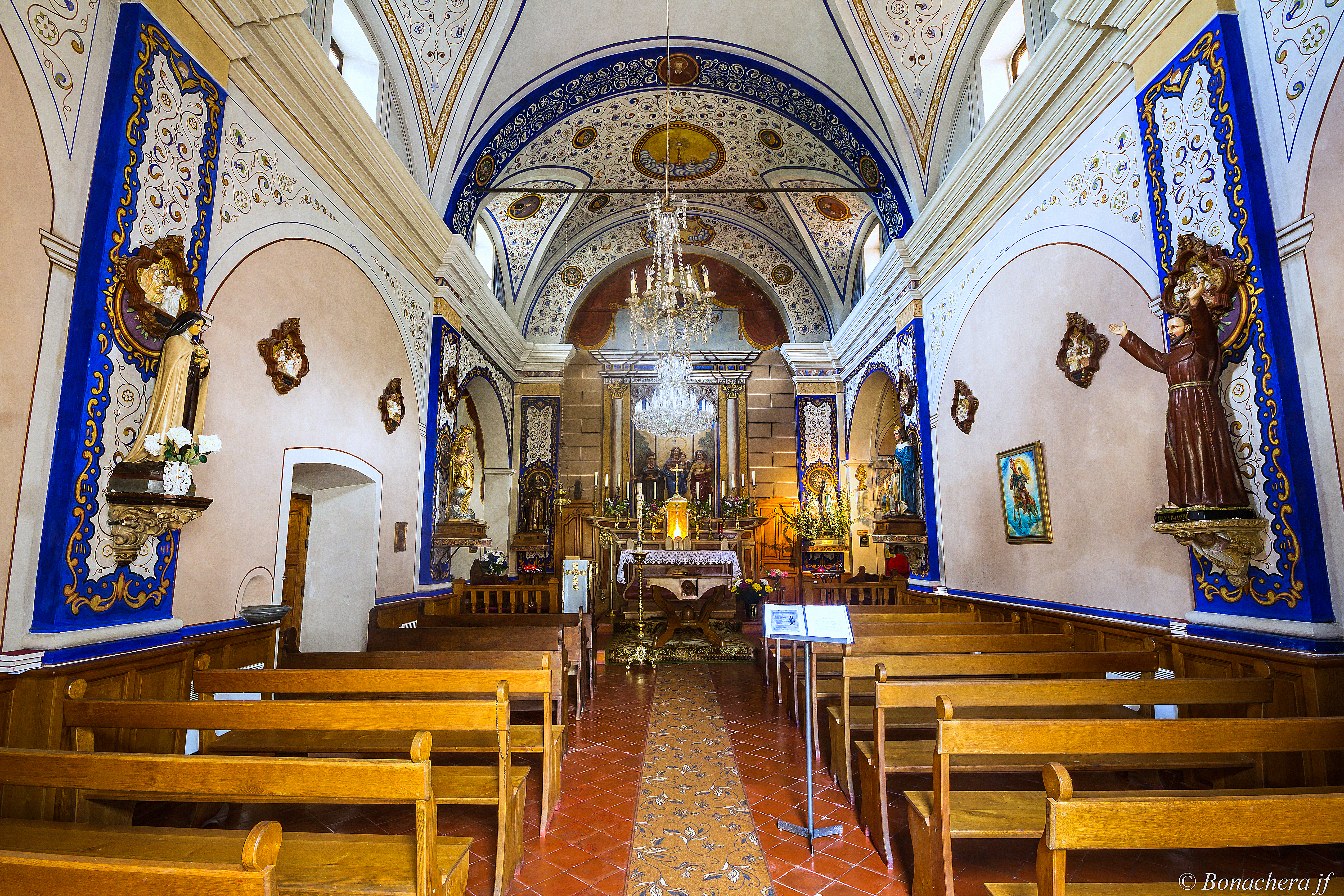 San-Gavino-di-Fiumorbo, Fiumorbo (Haute-Corse) - Intérieur de l'église Saint Antoine Abbé de San Gavinu di fiumorbu